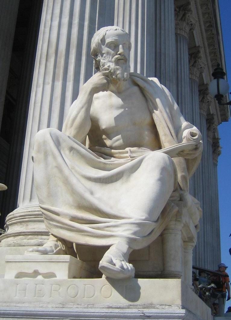 Herodot-Statue auf der linke Rampe des Parlaments: griechische Seite